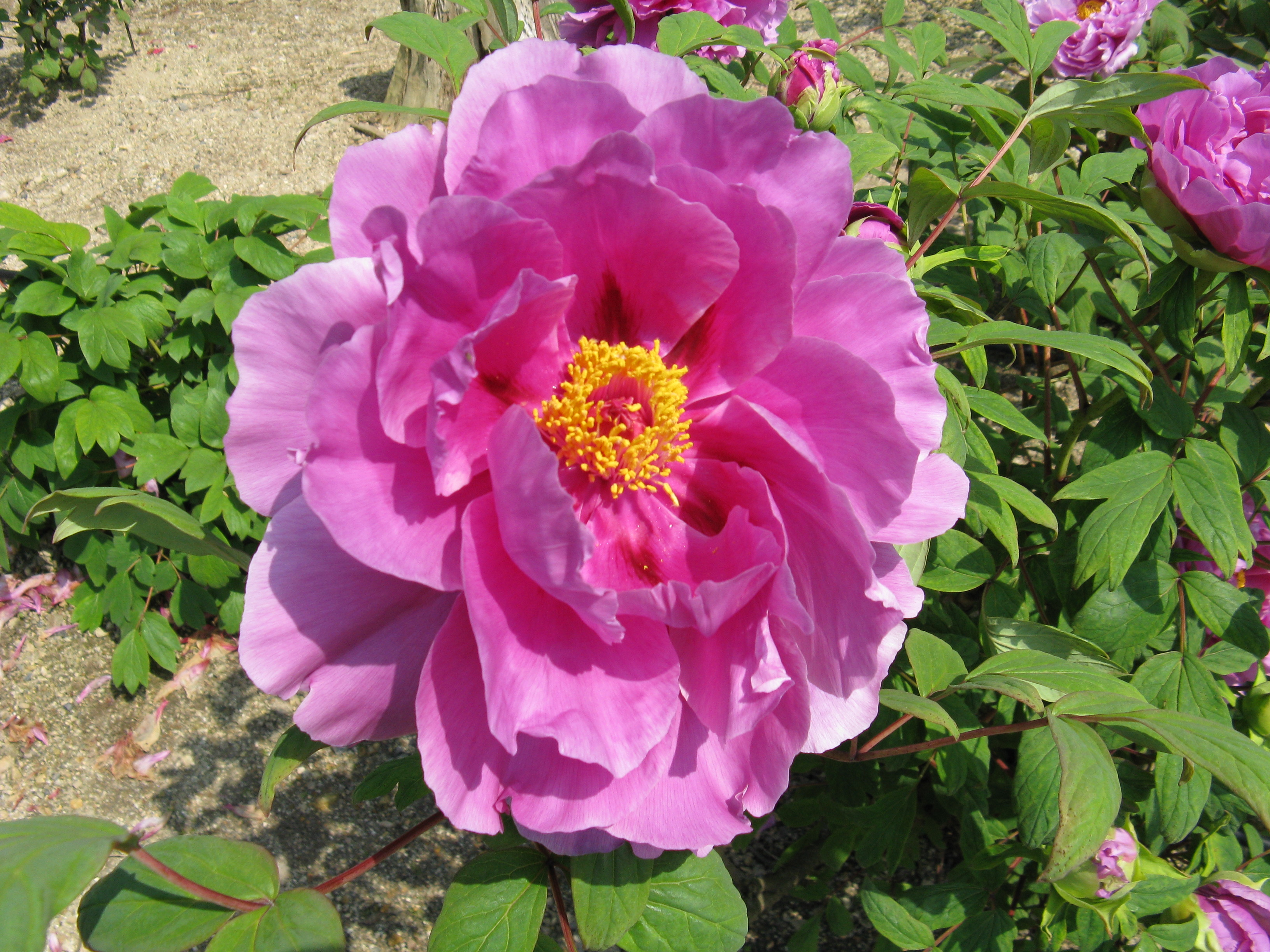 Paeonia suffruticosa '藤染衣'